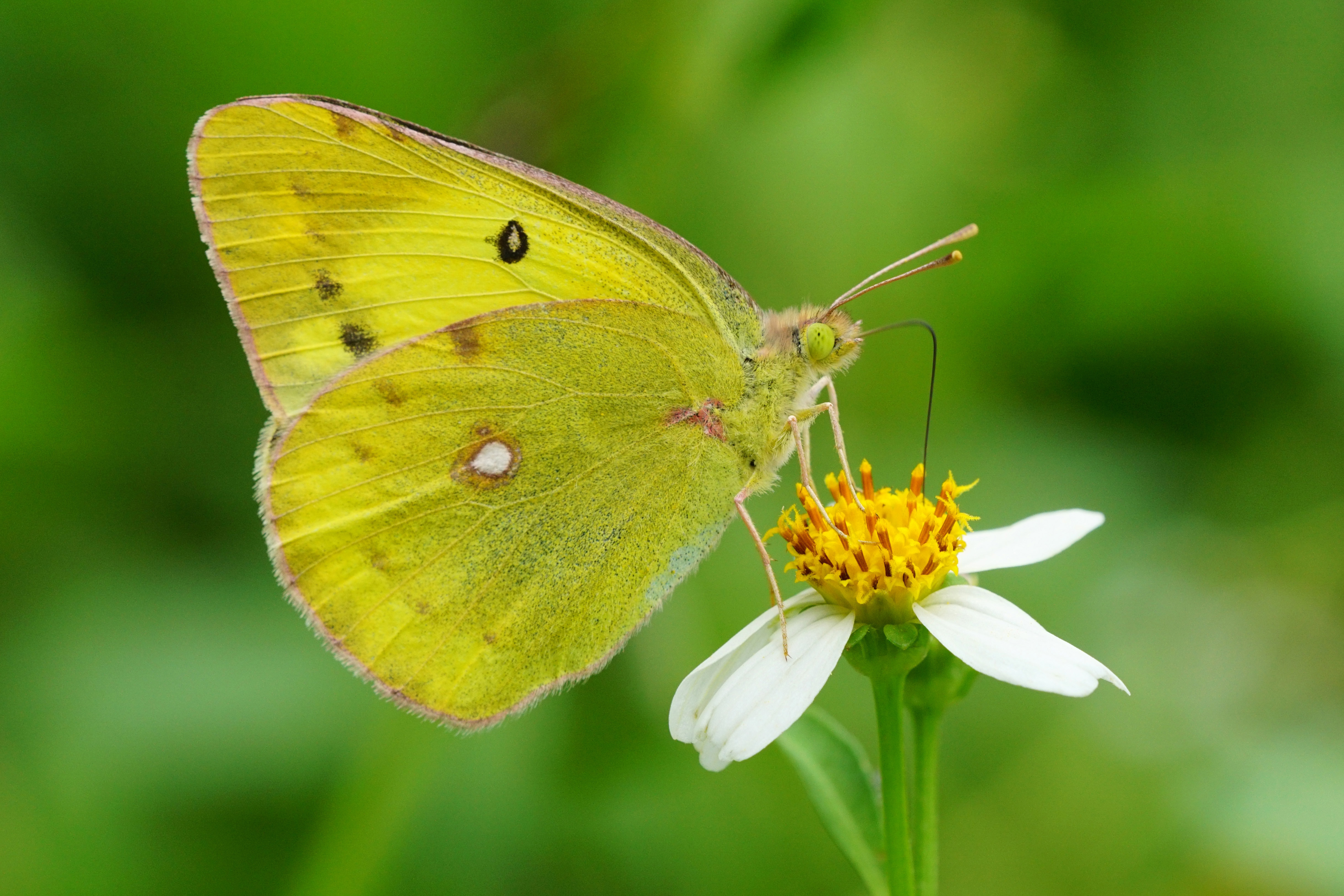 紋黃蝶 Colias erate formosana